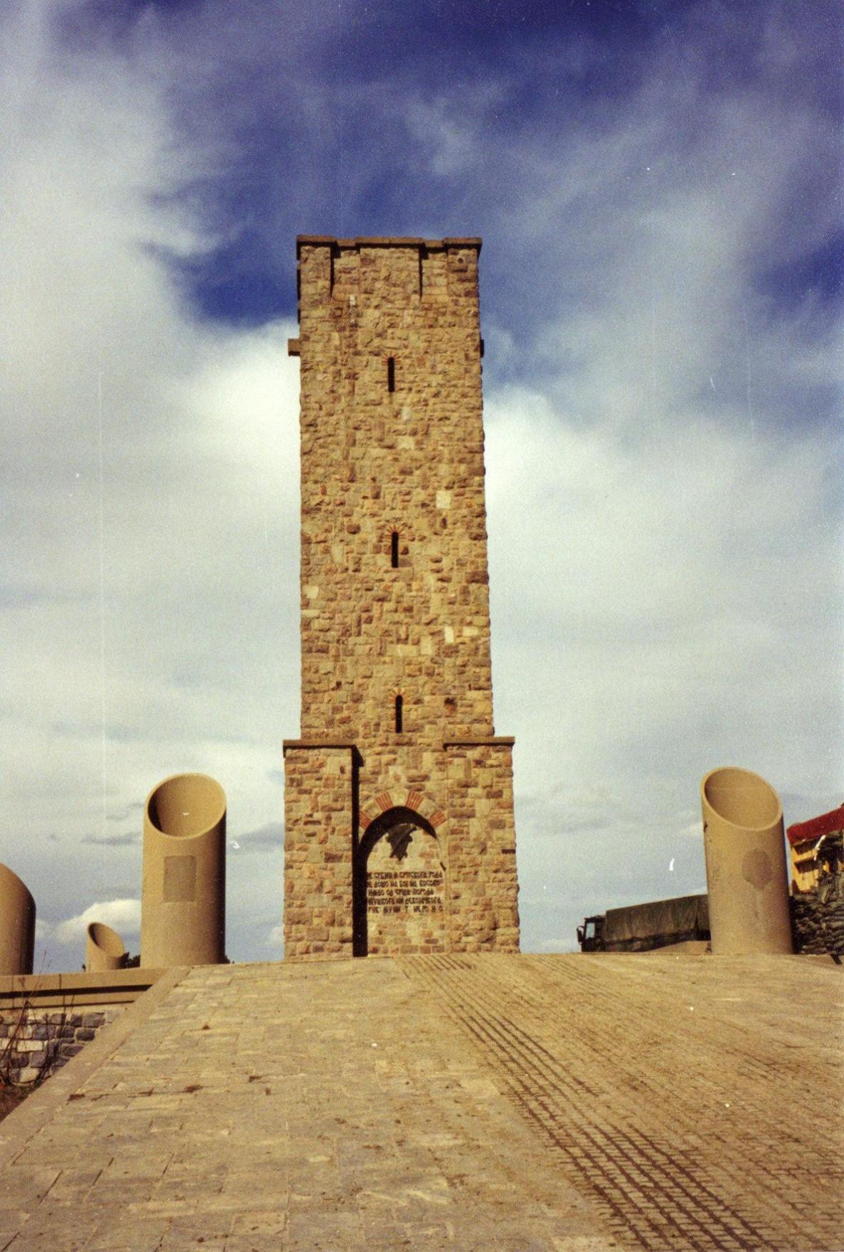 Le monument de Kosovo Polje